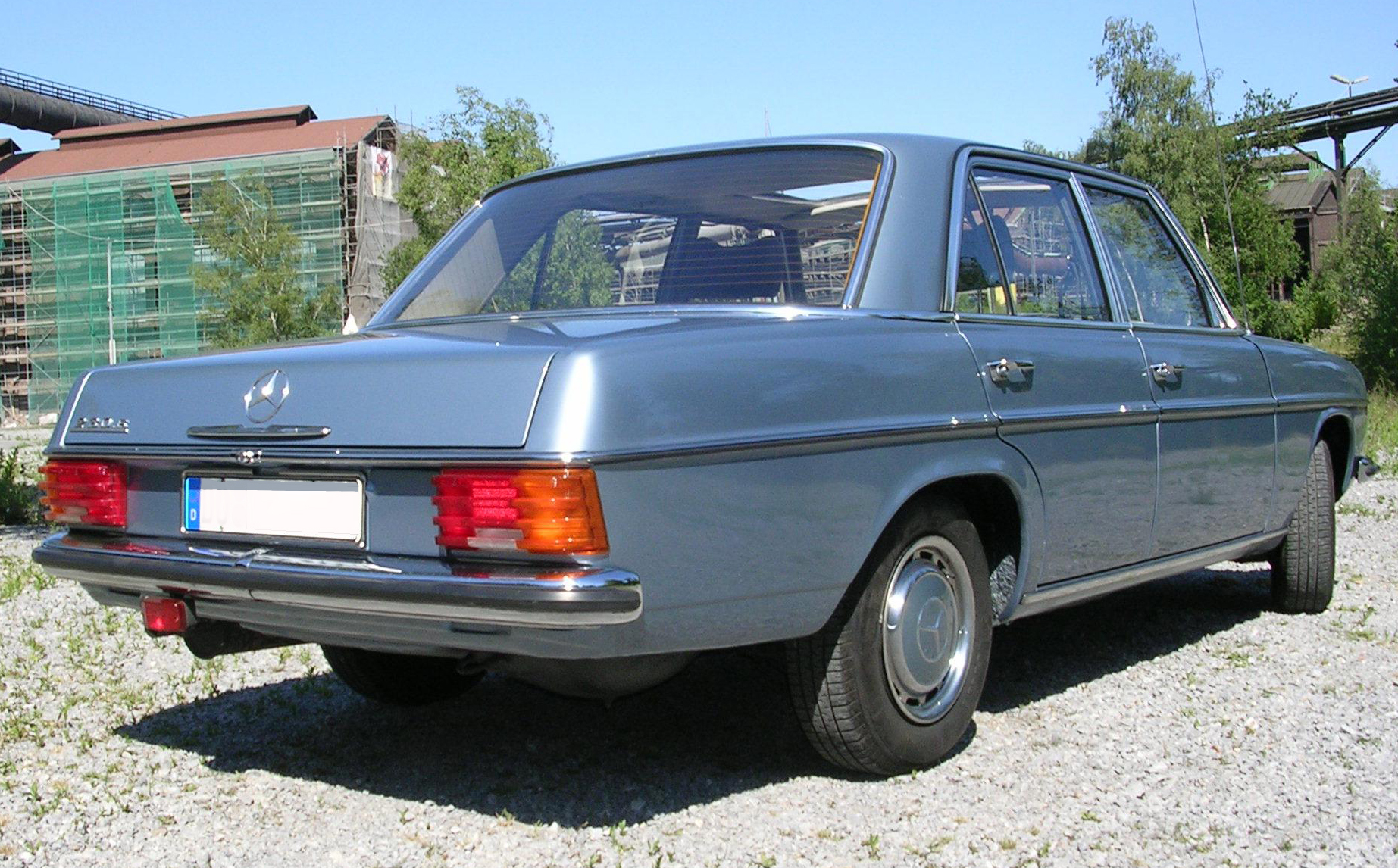 Mercedes Benz W114 230.6